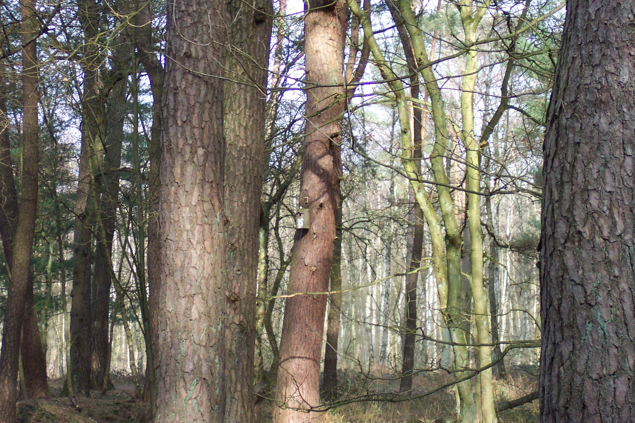 Hildener Heide, Hilden